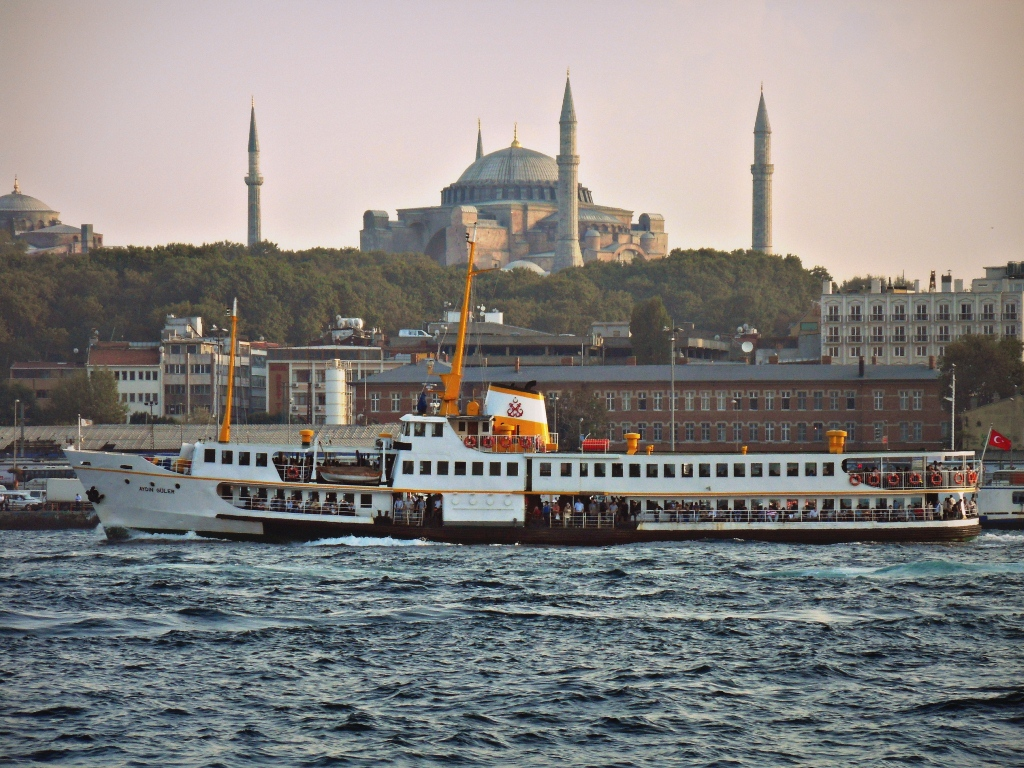 Şüheda tipi vapurlardan MS Aydın Güler